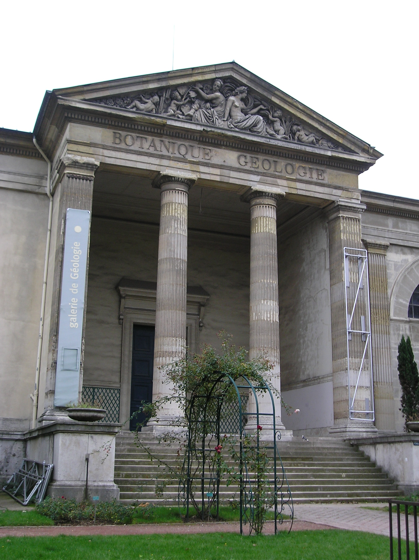 Jardin des Plantes de Paris. Photographie prise par François Trazzi